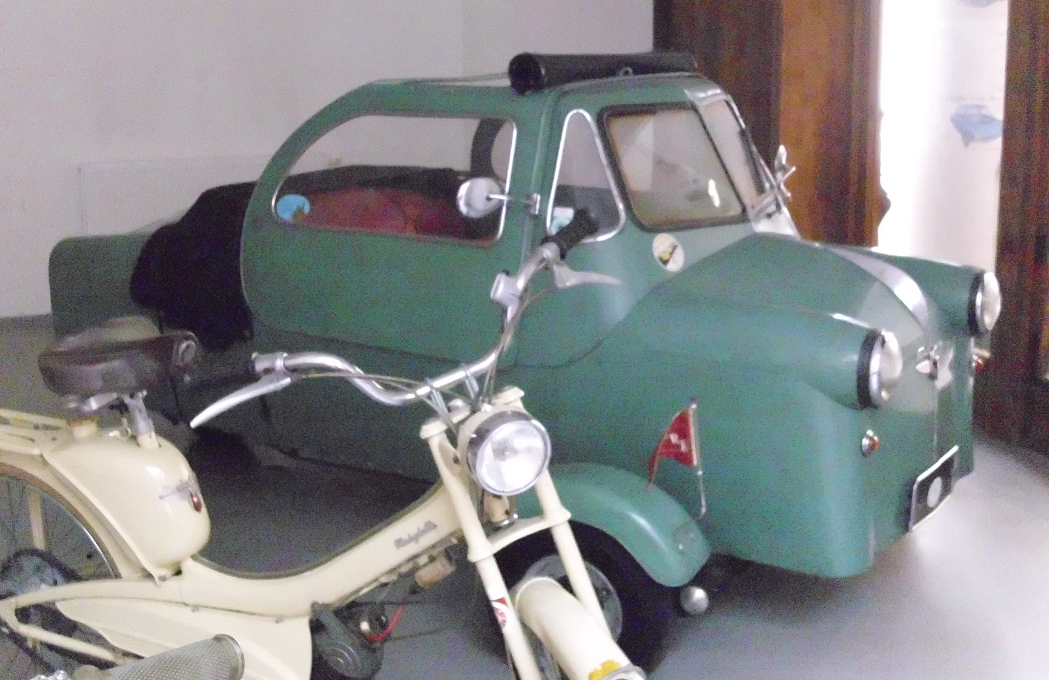 Felber Autoroller 1953 im RRR Roller, Rollermobile & Wurlitzer-Museum in Eggenburg, Österreich